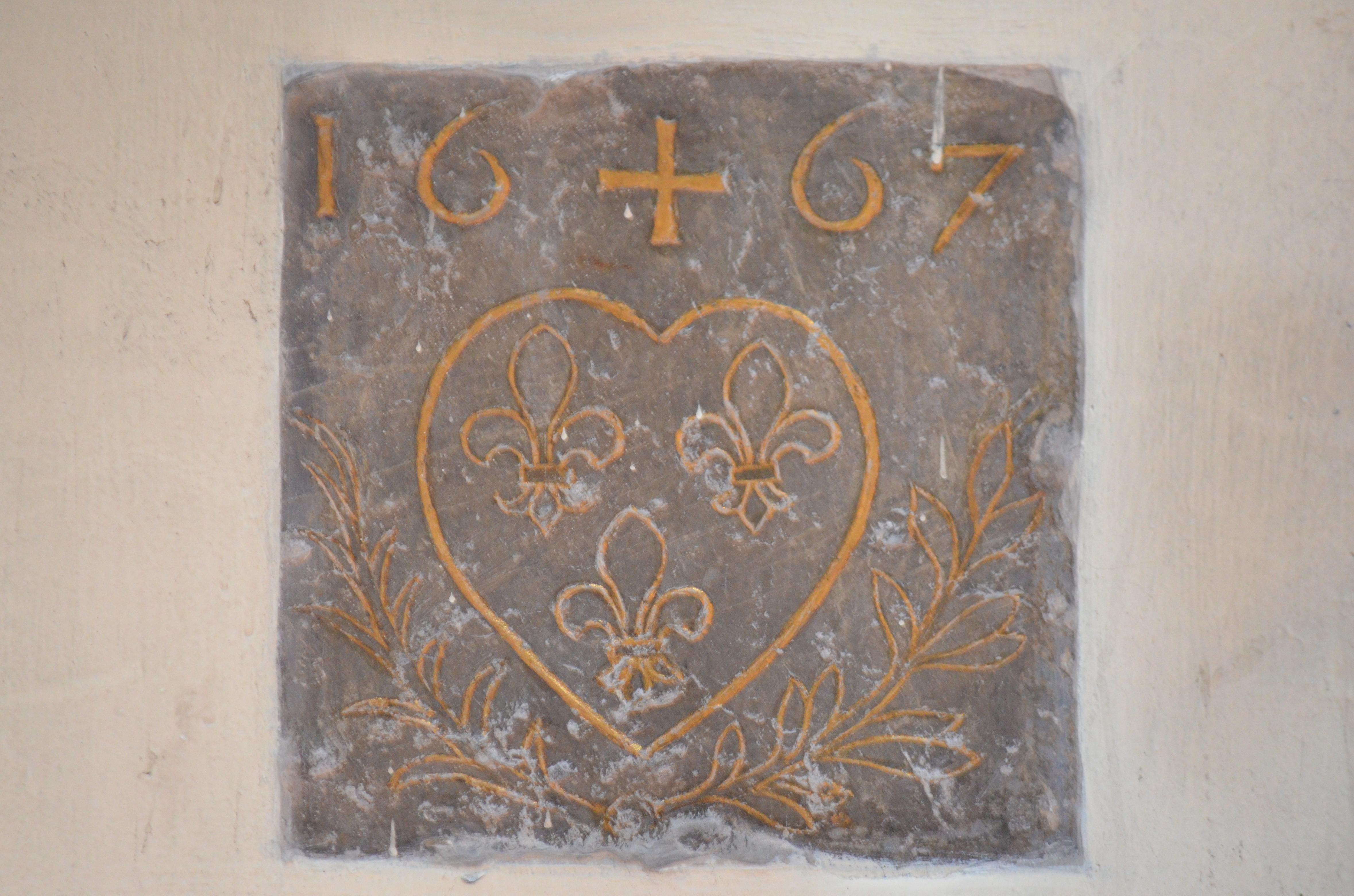 Charleroi - église Saint-Christophe - pierre de fondation de la première église - 1667